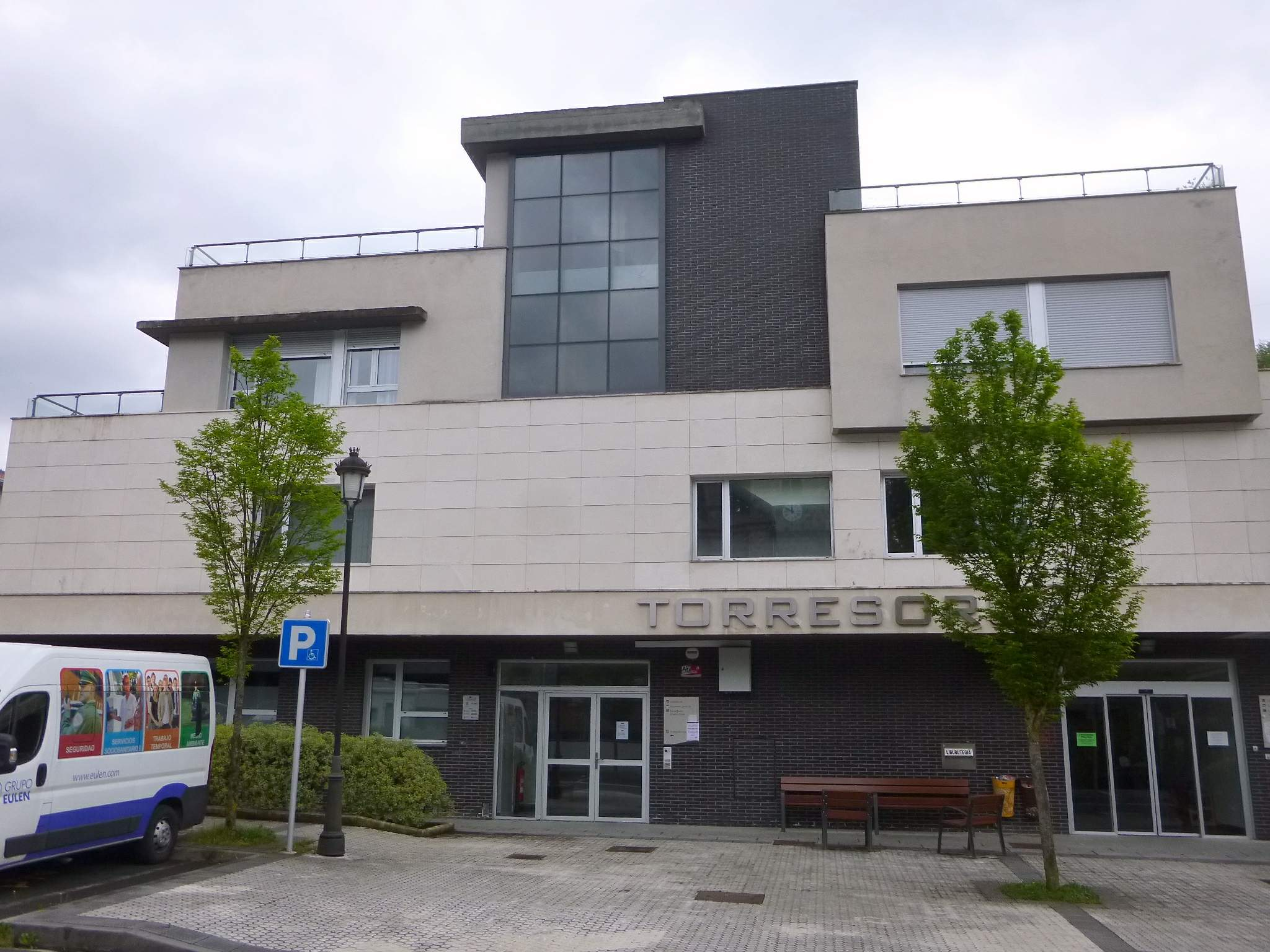 Antzuola - Auditorio Torresoroa